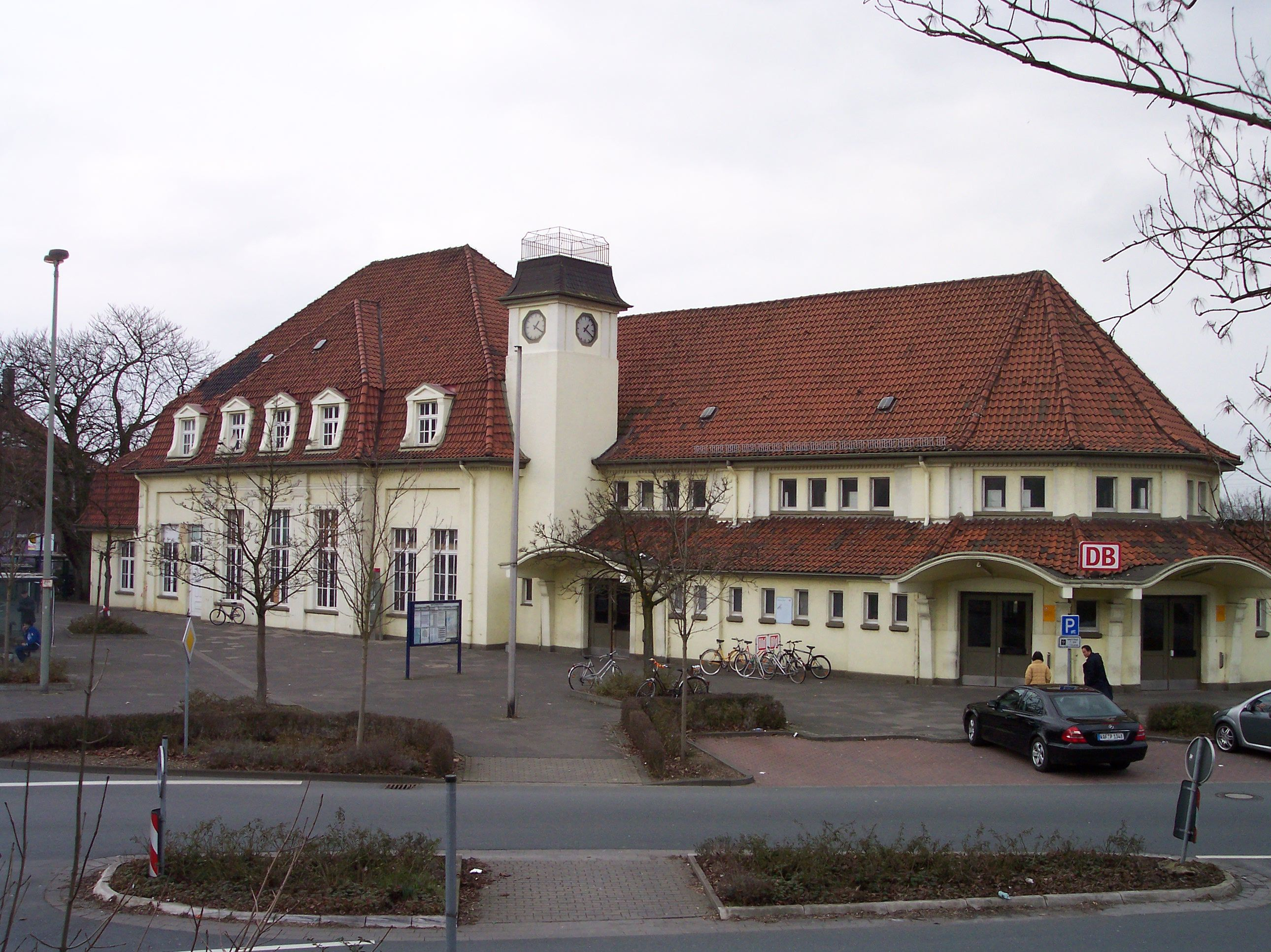 Bahnhof Neubeckum, Empfangsgebäude Straßenseite